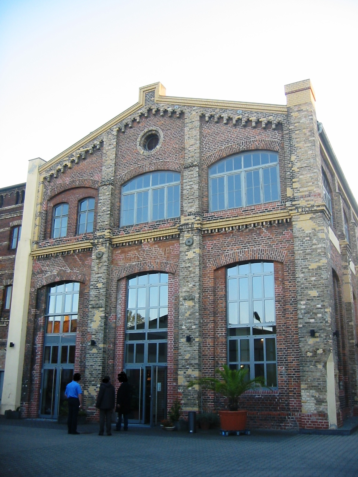 Spirituosenhersteller Abtshof in Magdeburg